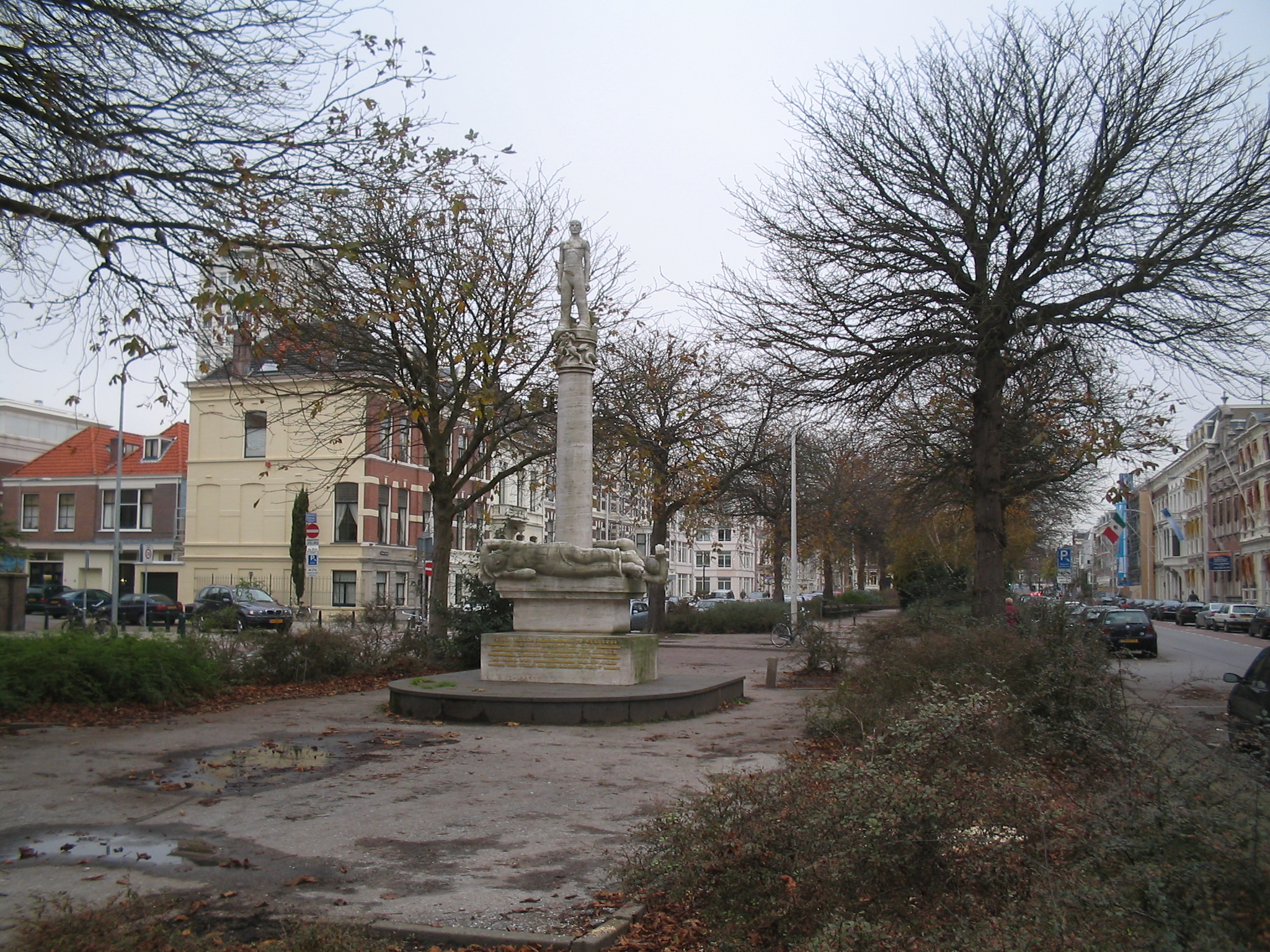 Den Haag Nassauplein, Monument gevallen PTT'ers van Hildo Krop